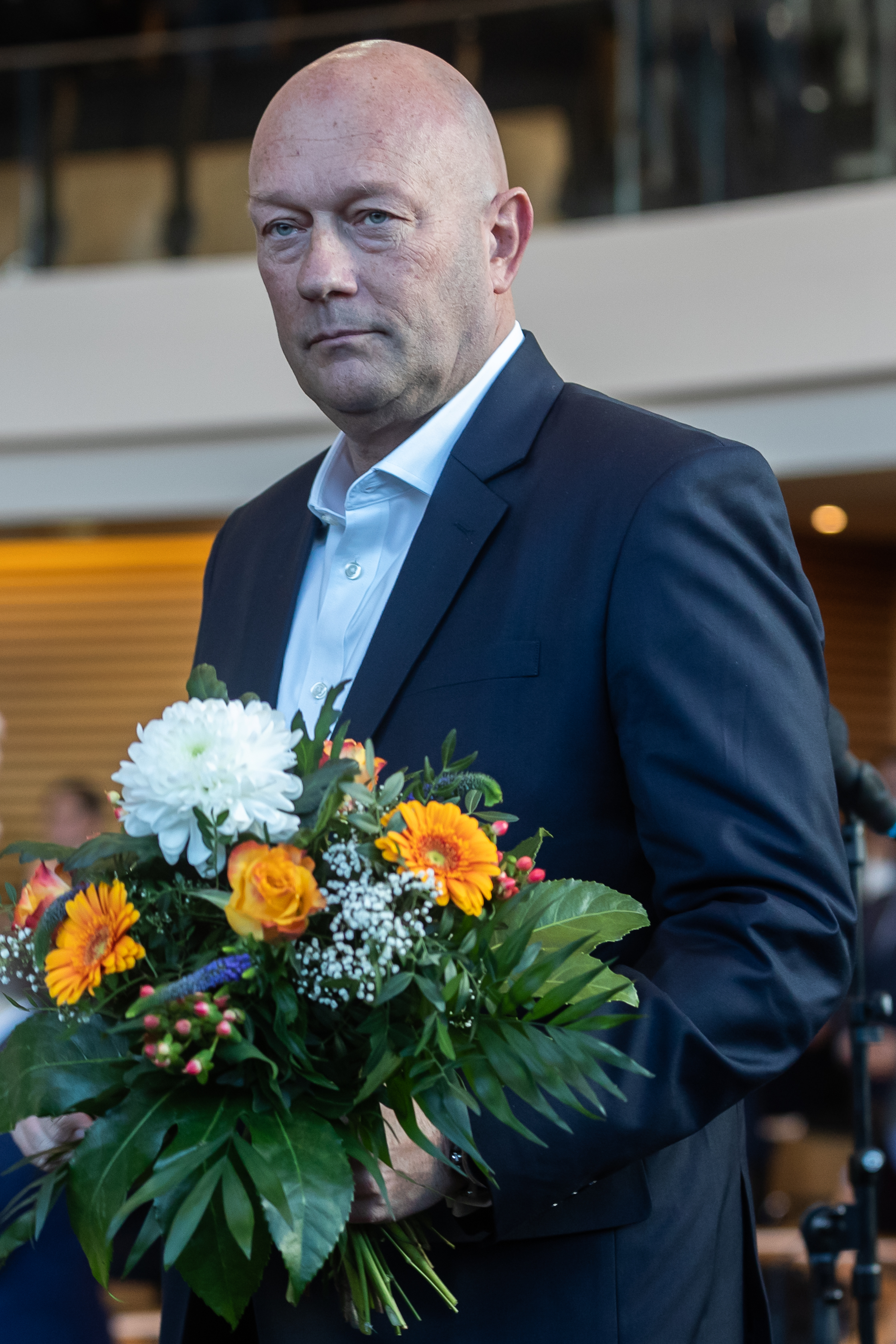 Thüringer Landtag, Wahl des Ministerpräsidenten: Thomas L. Kemmerich (FDP, Landes- und Fraktionsvorsitzender in Thüringen) nach der Vereidigung als neuer Ministerpräsident